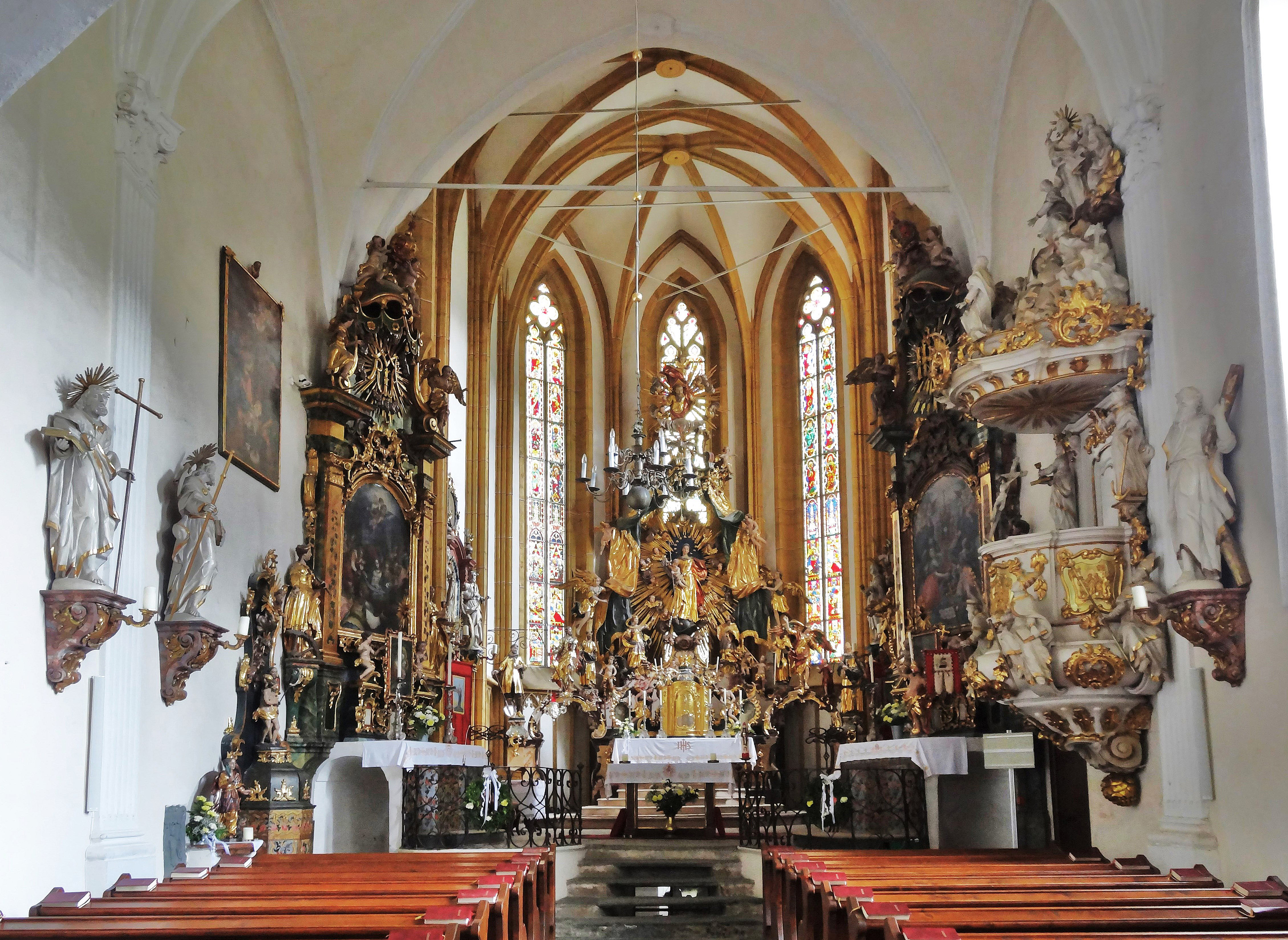 Kath. Pfarrkirche hl. Margarethe, Innenansicht